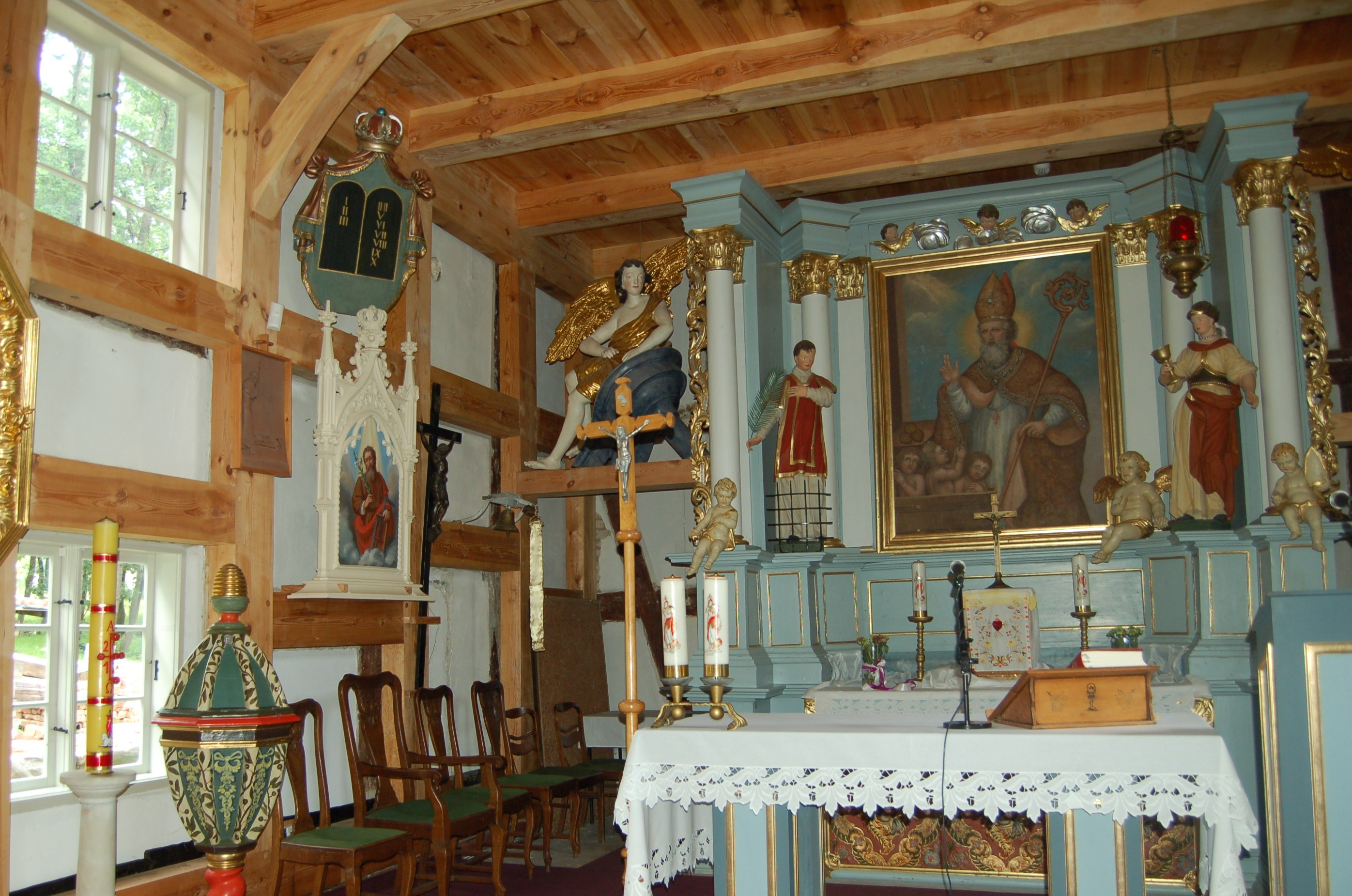 Czapielsk, Kosciol pw sw. Mikolaja Biskupa , gm. Kolbudy